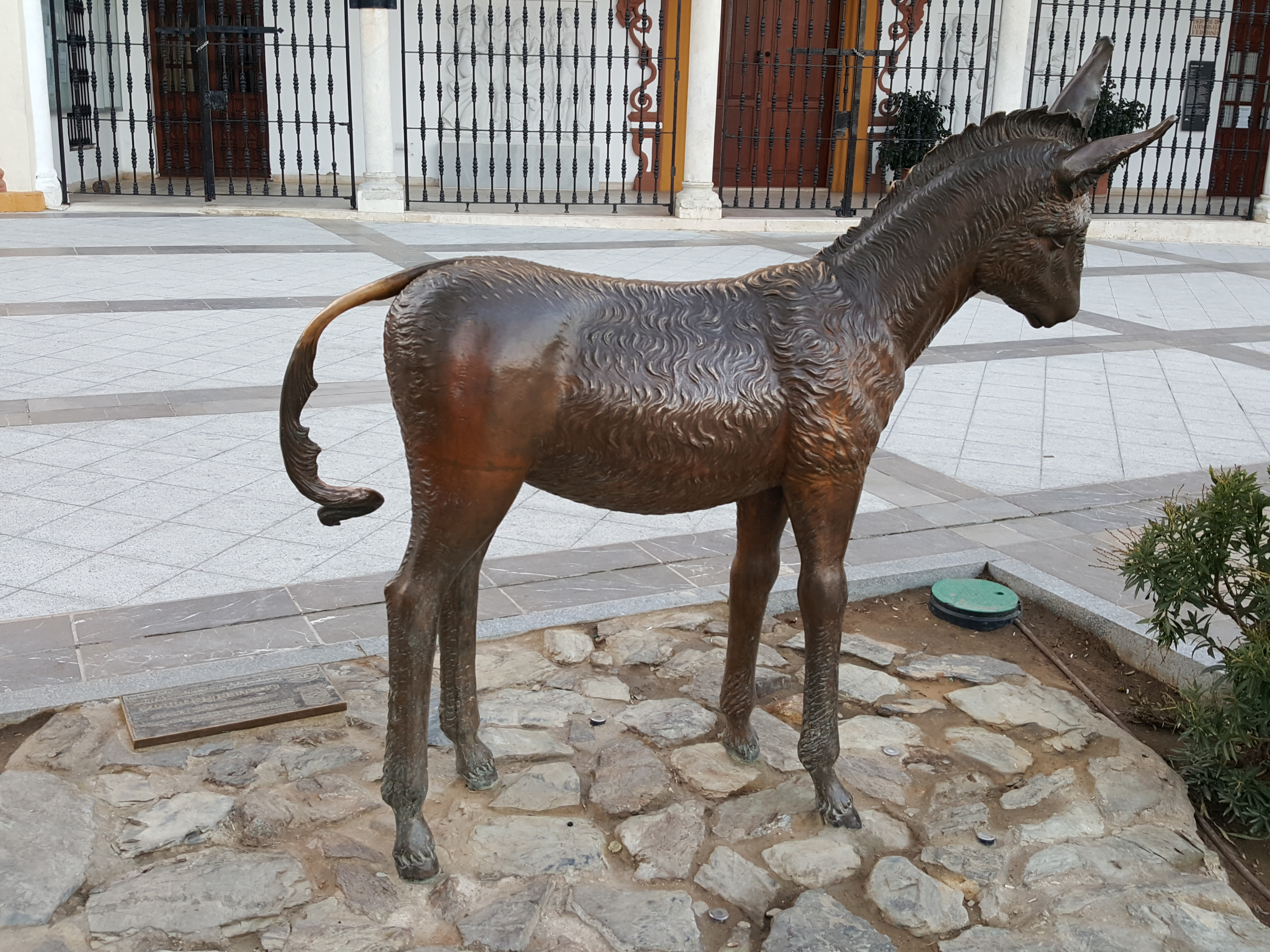 Escultura Perteneciente al Museo, al aire libre Moguer EScultura de Moguer, Andalucía (España). Escultura Incluida en la serie PlateroEScultura con el nombre "Platero".